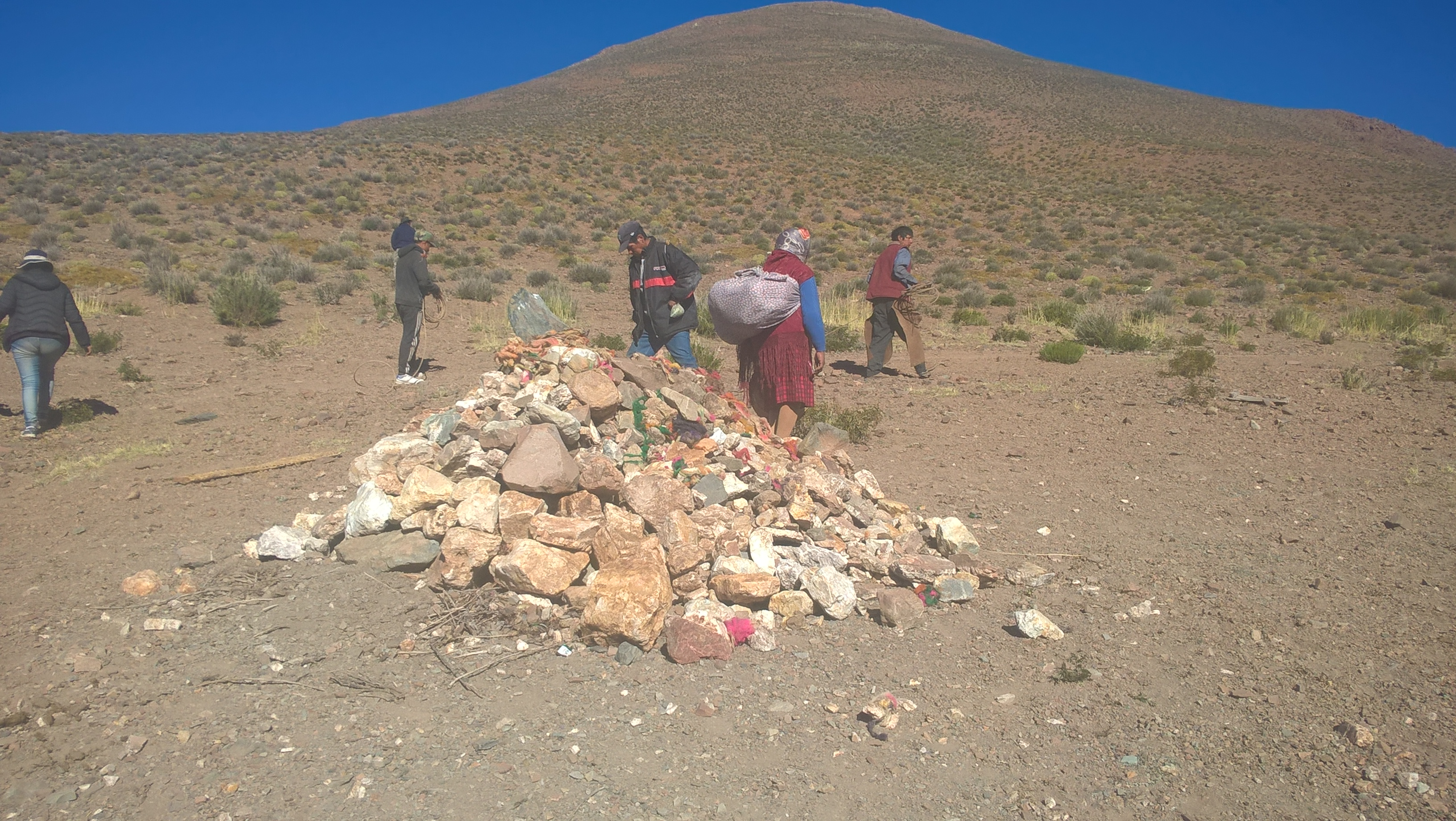 monumento cultural. lugares